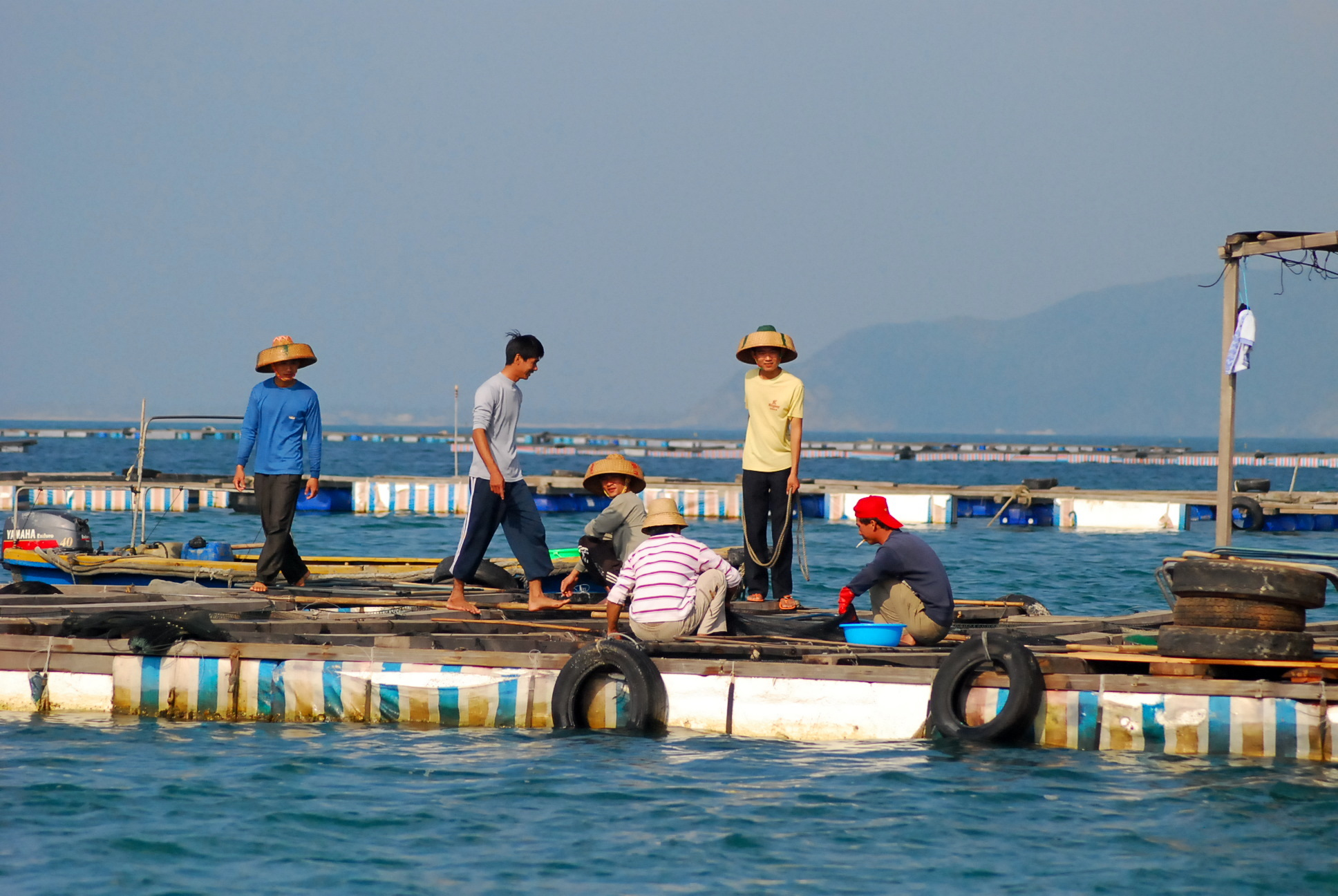 工作中的蛋家，于三亚